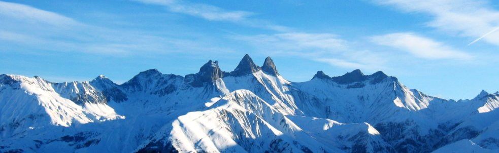 Vue panoramique des Aiguilles d'Arves. Montage à partir de trois photos. Clichés obtenus sur la route menant à Saint-Jean d'Arves.